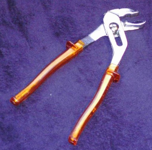 Beschreibung: Eine Zange (Wasserpumpenzange mit aufgelegtem Gewerbe) Quelle: fotographiert am 6. Juni 2004 Fotograf: Oktaeder Lizenzstatus: Public Domain